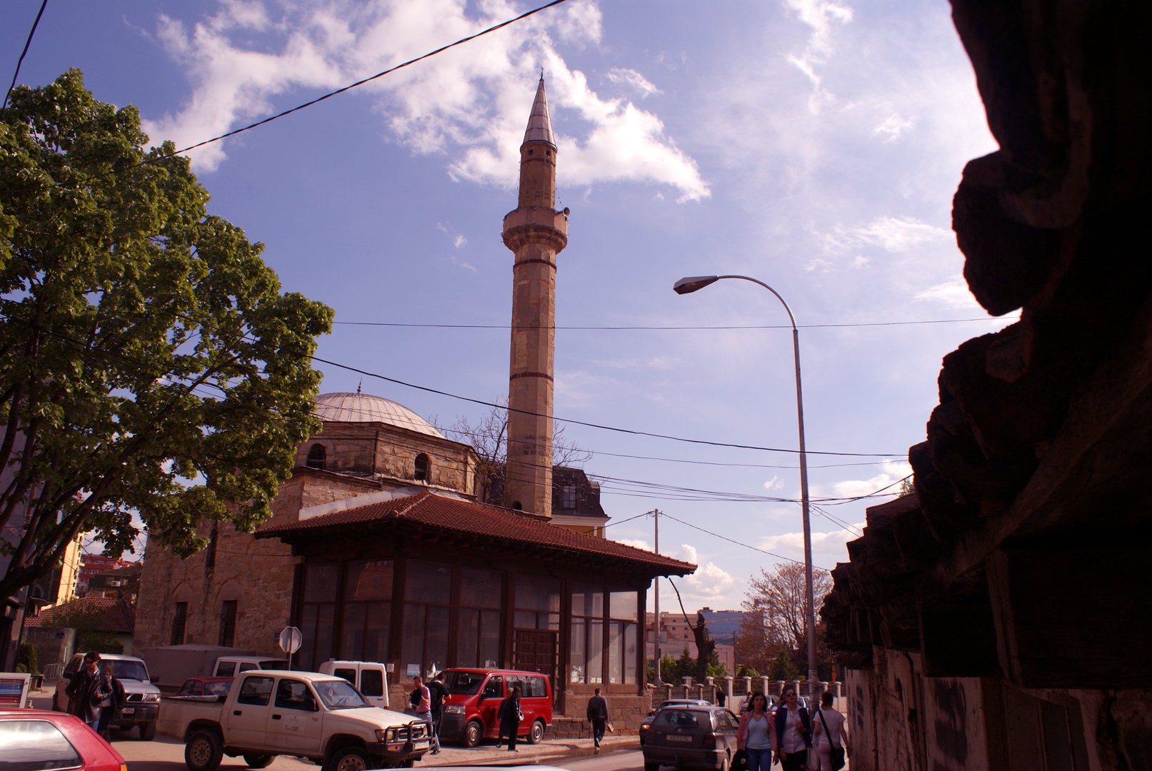 Xhamia e Jashar Pashës